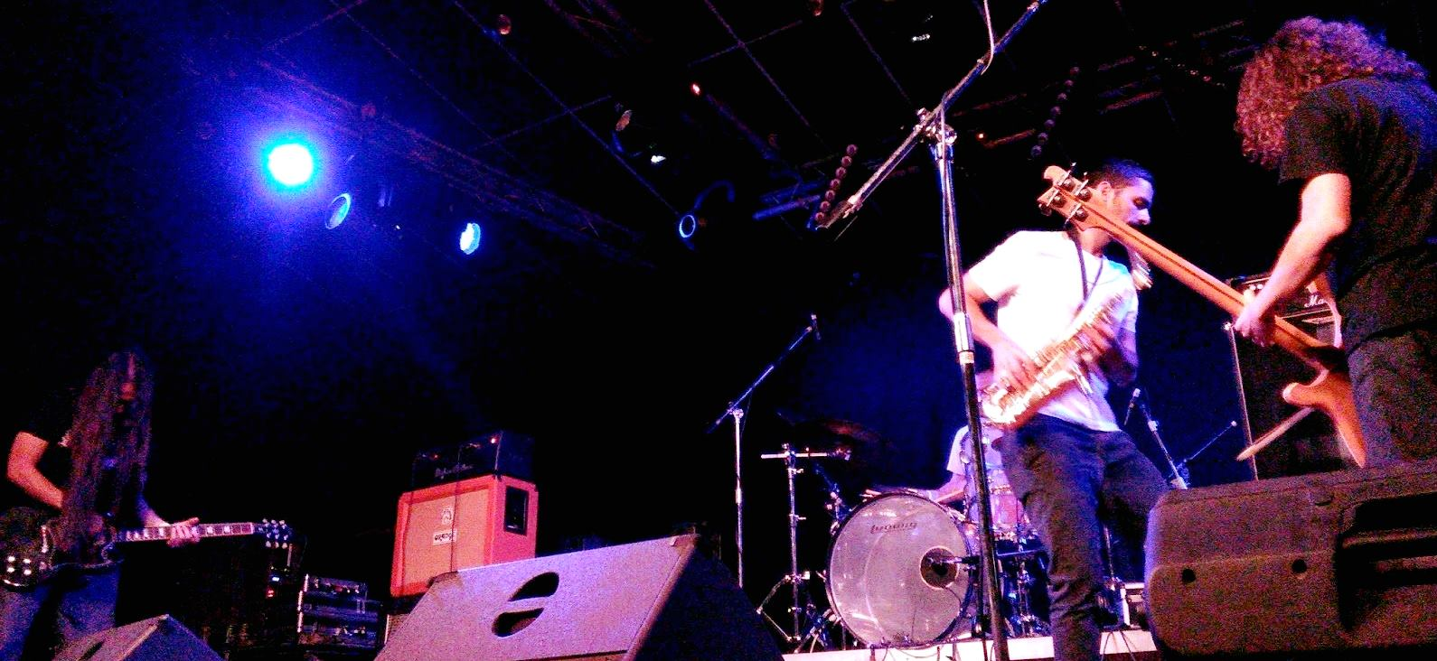 Reunión de la formación original, con la colaboración de Achilleas Polychronidis